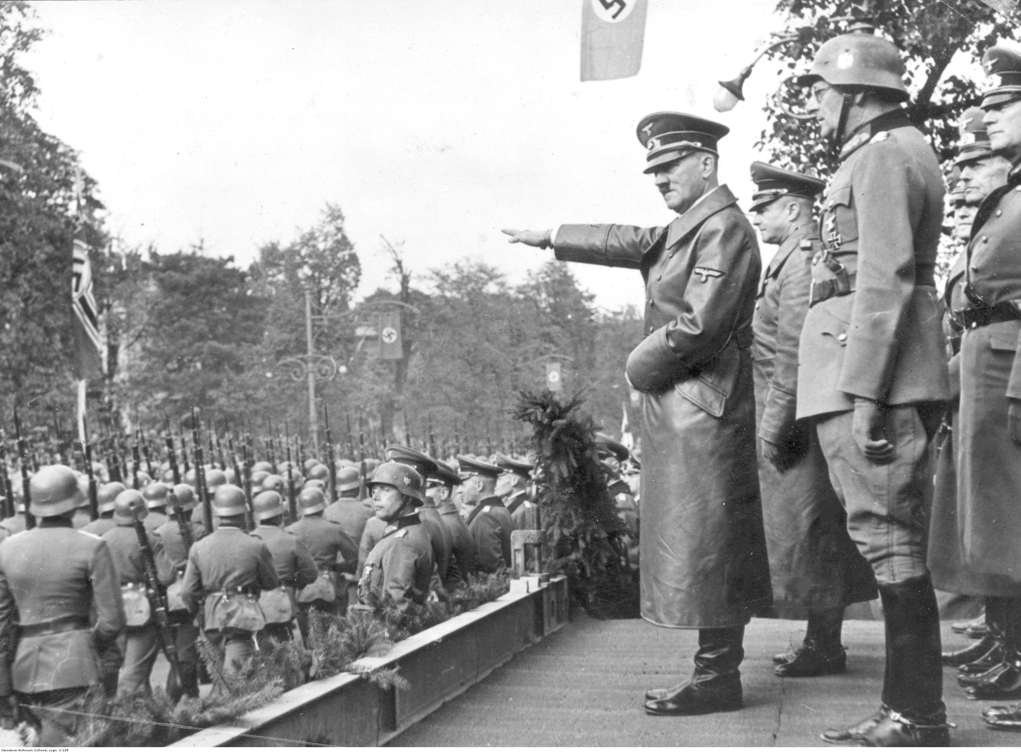 Adolf Hitler przyjmuje defiladę wojsk niemieckich w Alejach Ujazdowskich w Warszawie. Widoczni także: gen. Gunther von Kluge (2 z lewej), gen. Maximilian von Weichs (w hełmie), gen. Fedor von Bock (2 z prawej)